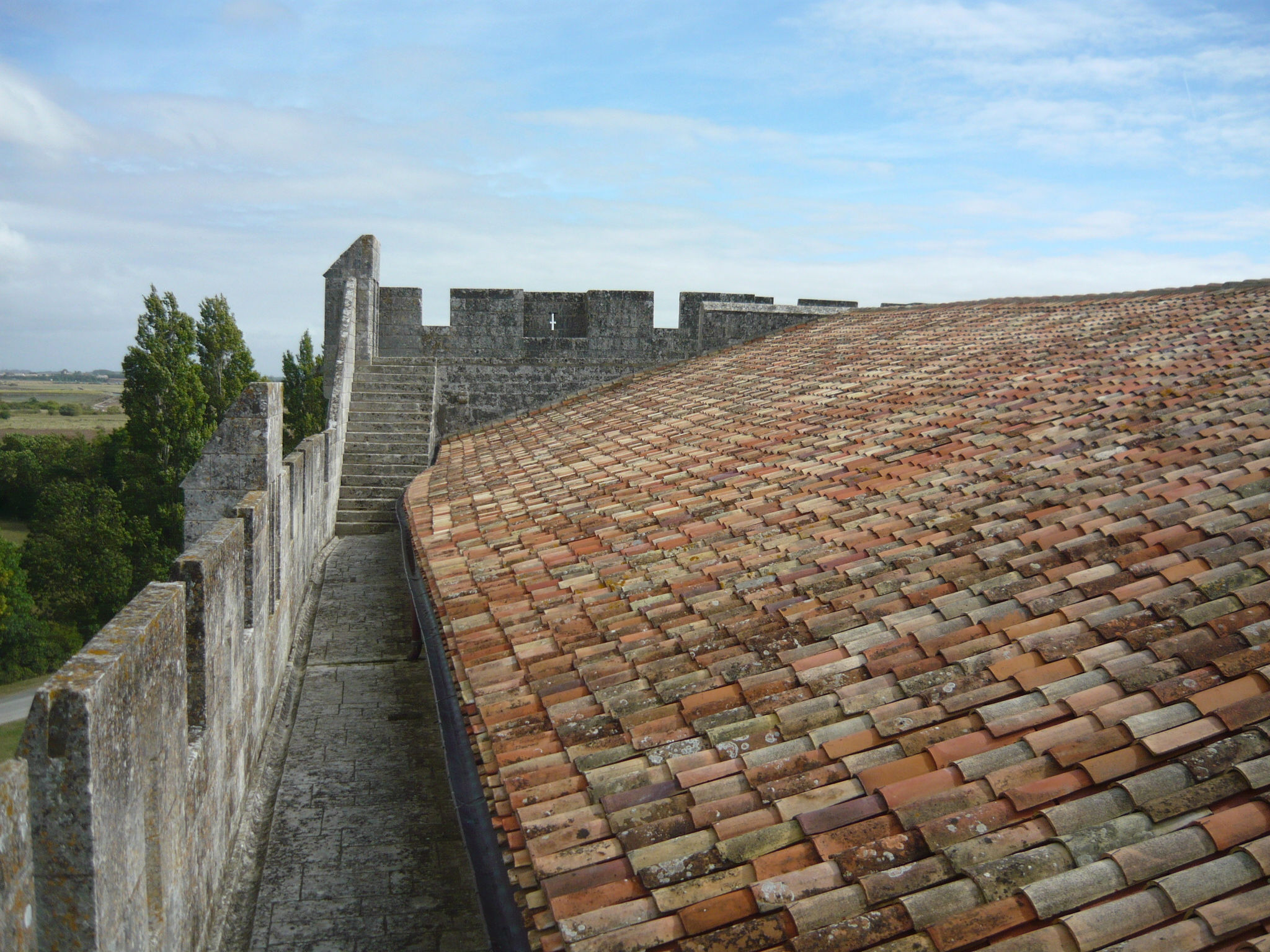 Supre de la murego de la preĝejo Saint-Martin en Esnandes (Charente-Maritime, Francujo).